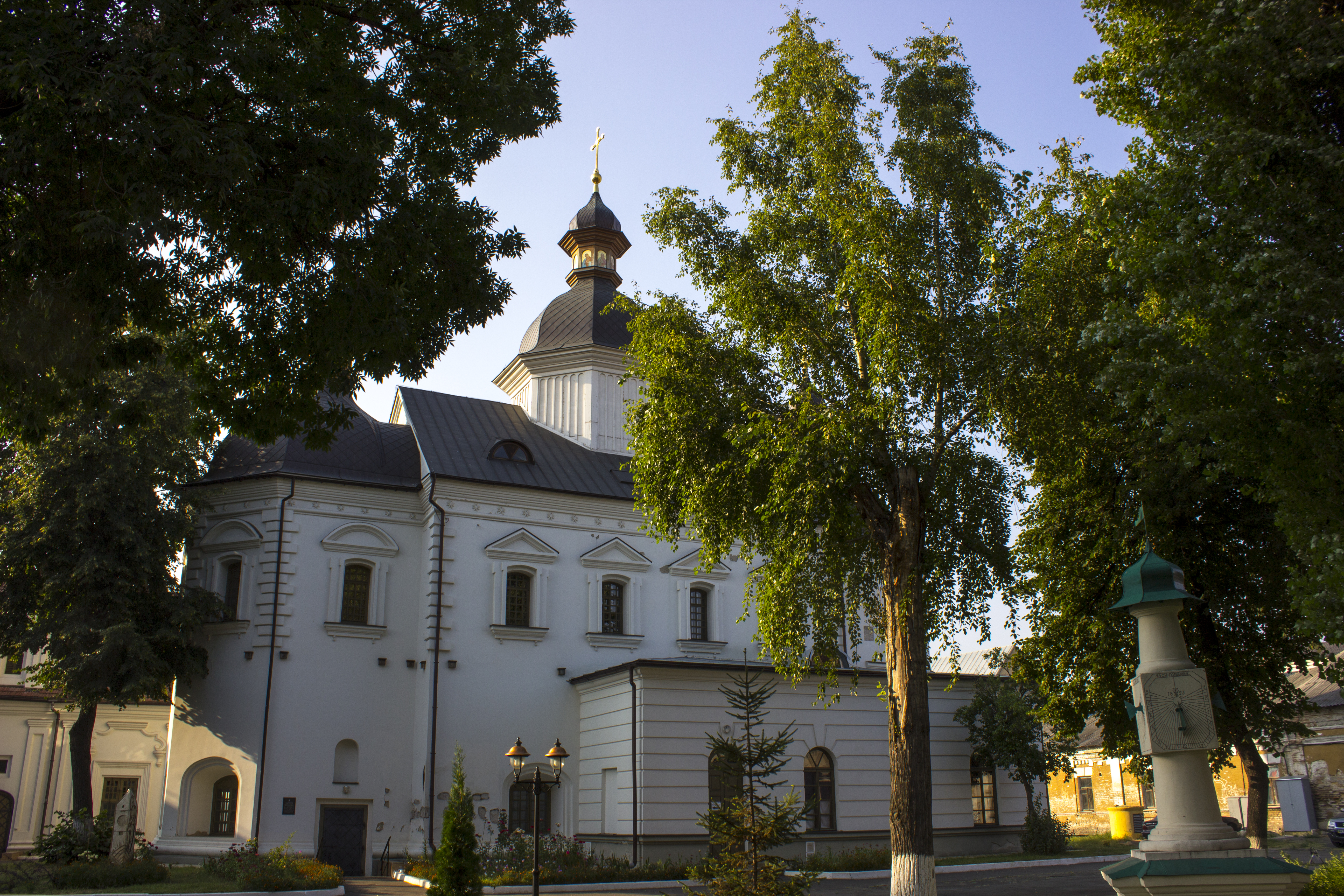 Трапезна з церквою Святого Духа, Київ, Сковороди Григорія вул., 2-а